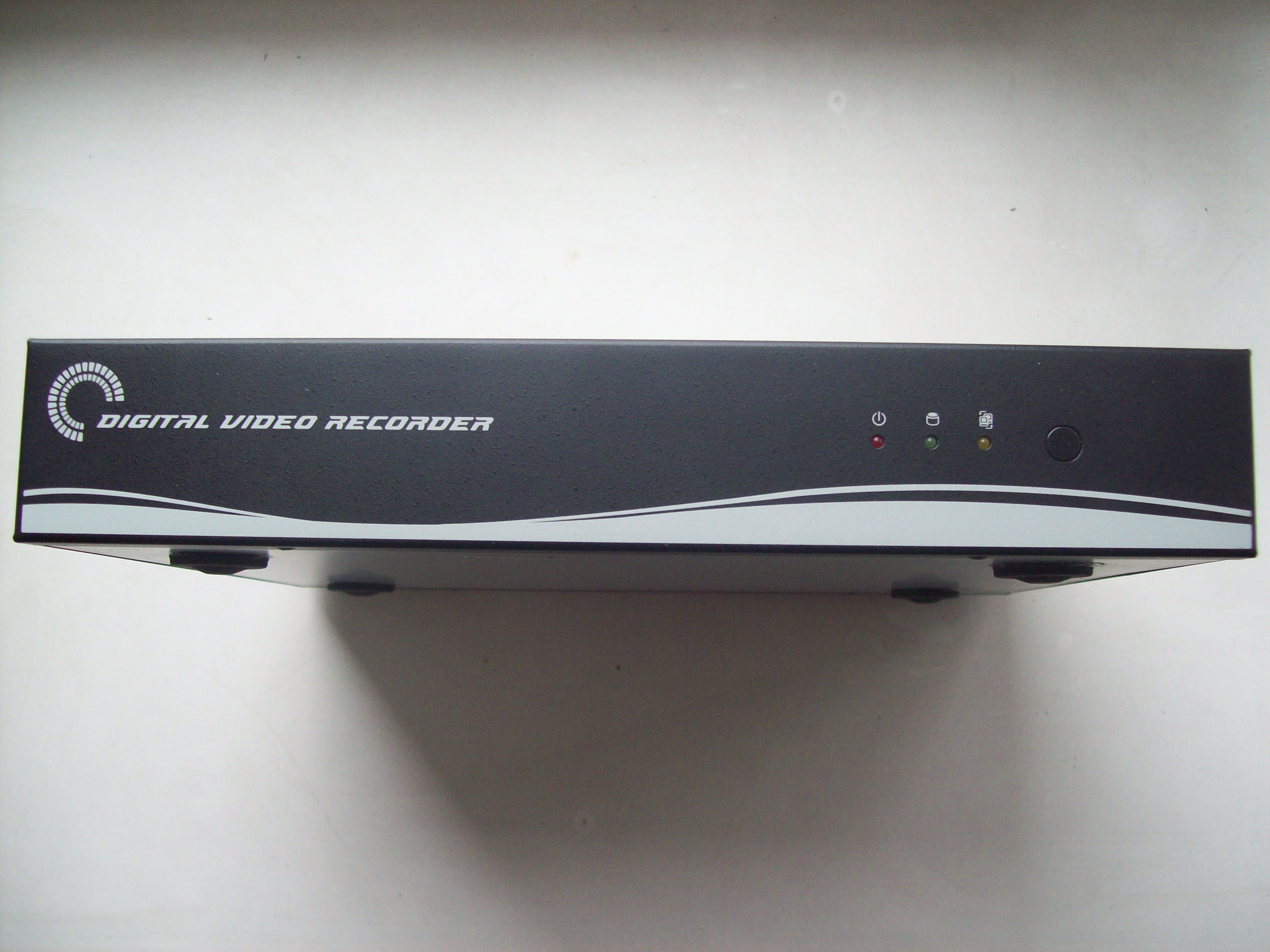 Знято фотоапаратом Кодак